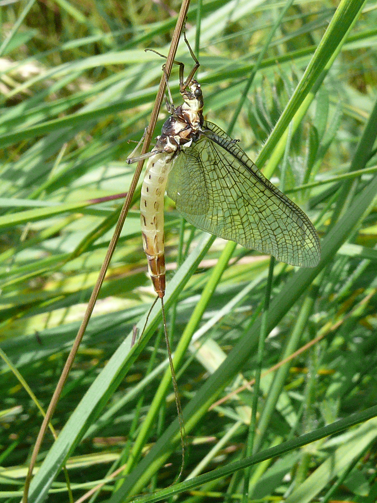 Ephoron virgo